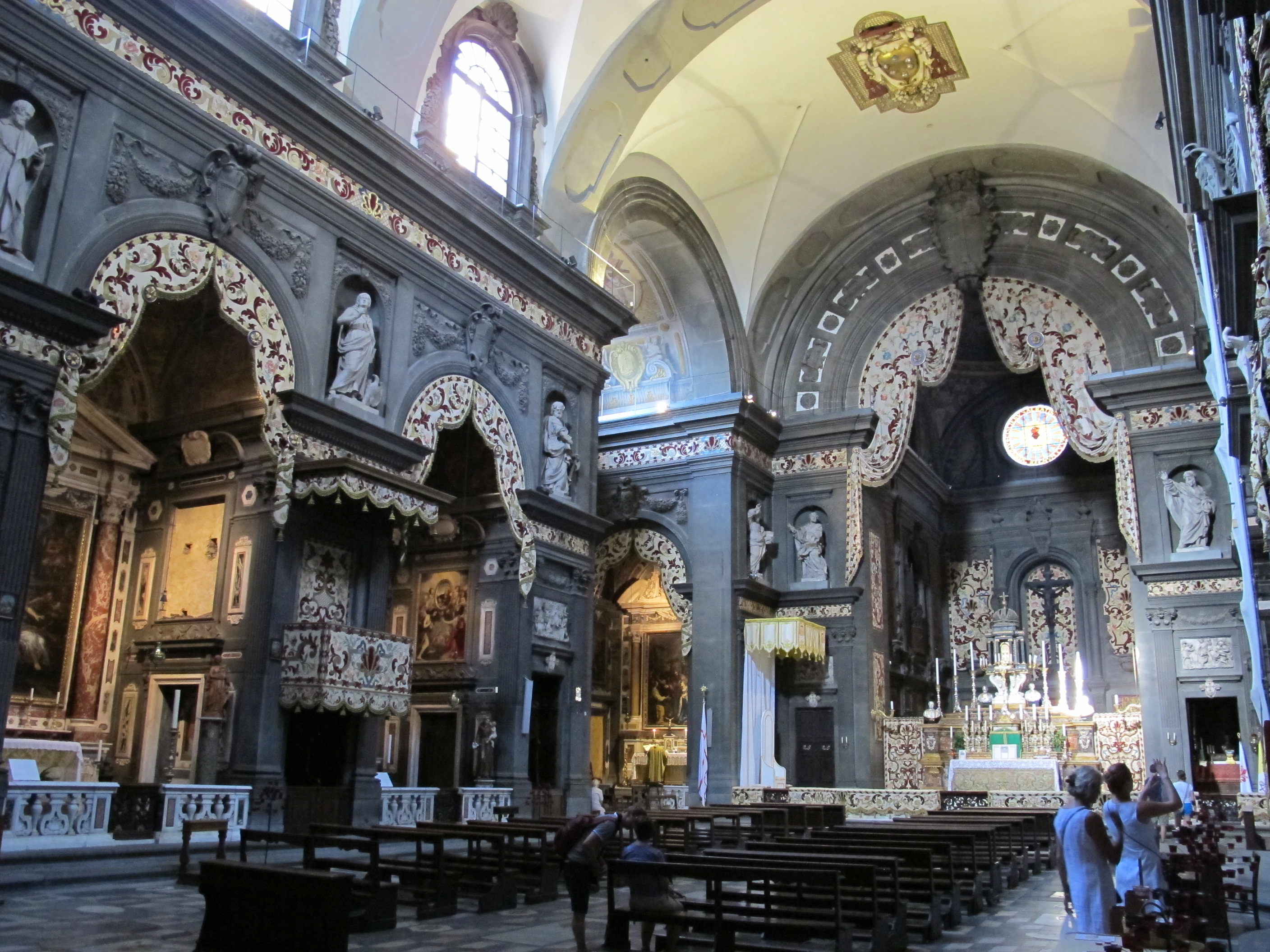 San gaetano col parato 01.2